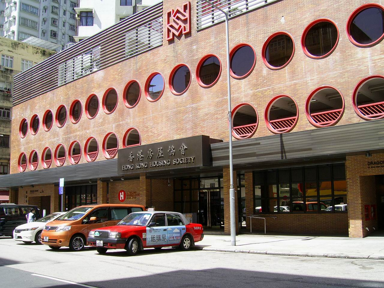 中文（香港）: 位於大坑龍濤苑的香港房屋協會申請組